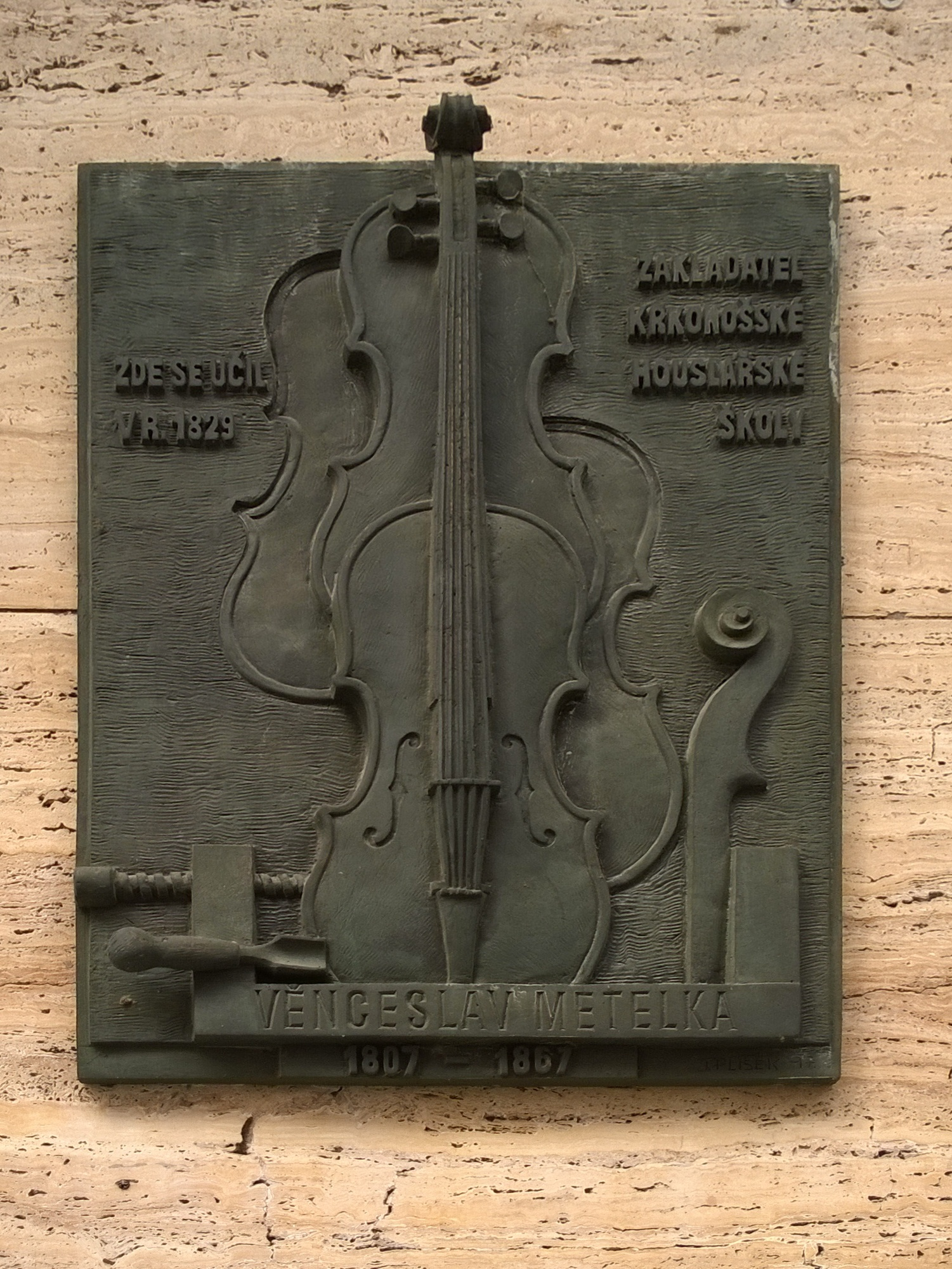 Pamětní deska, signováno vpravo dole J. Plíšek 97.